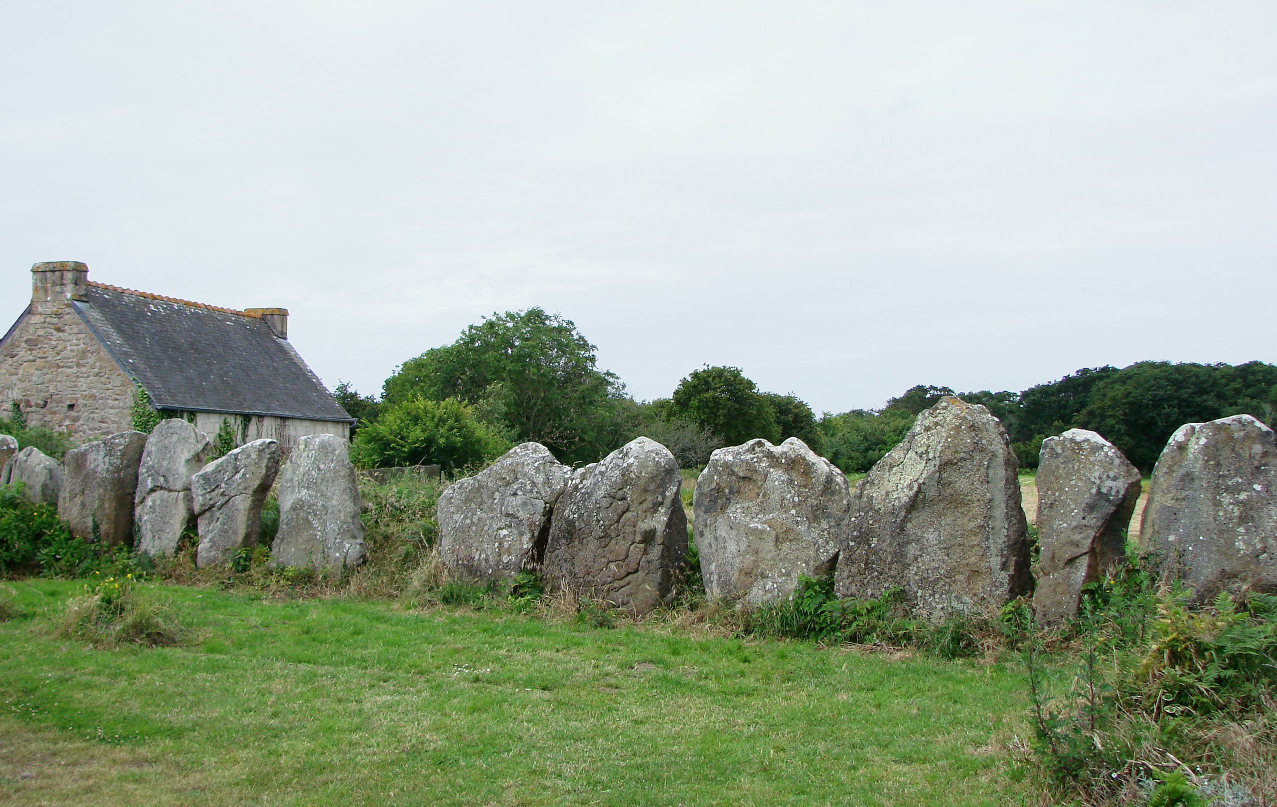 Ces menhirs ont été réemployés pour réaliser la clôture d'un terrain à Carnac.